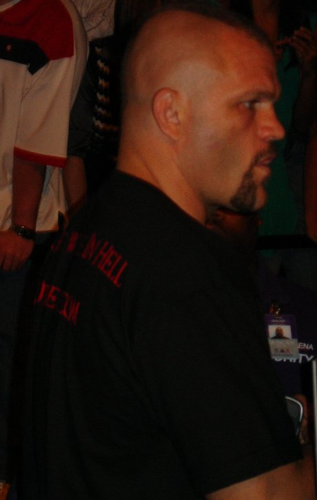 O lutador Chuck Liddel